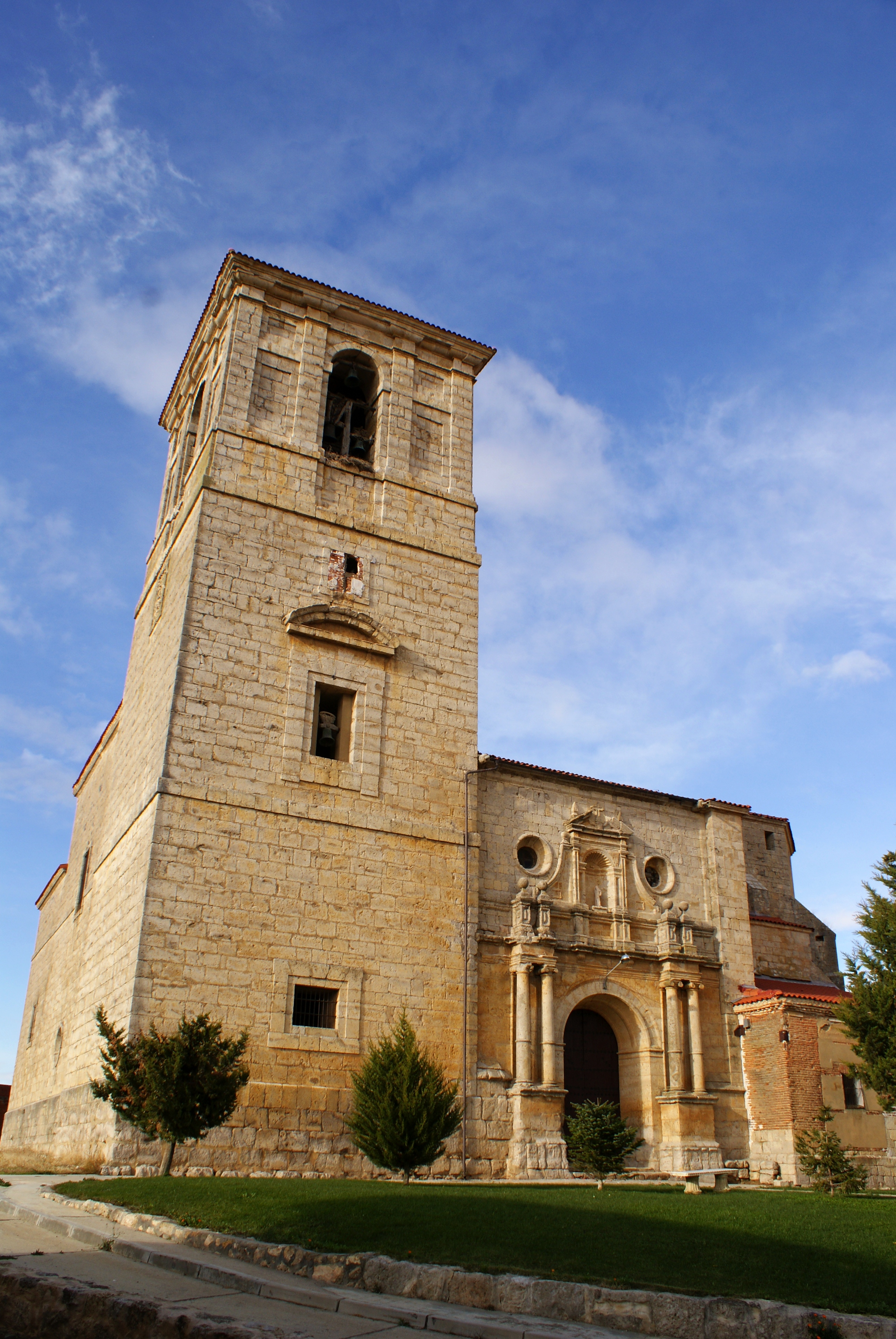 Iglesia de San Cipriano de Pedraza de Campos, Provincia de Palencia (España)